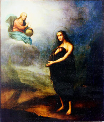 Мария Египетская